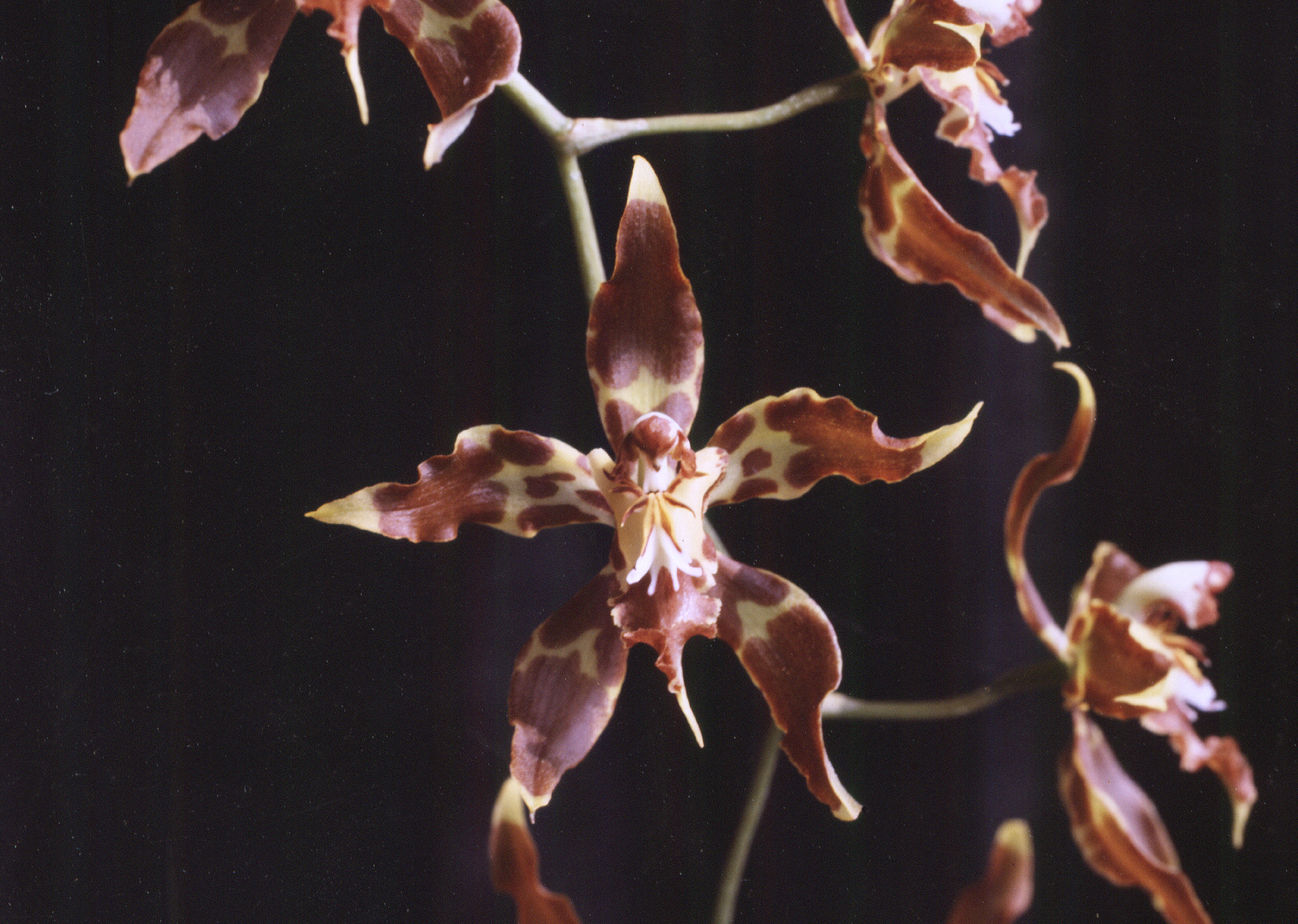 Orchidee der Gattung Odontoglossum: Odontoglossum cristatum. Aufnahme von 1982